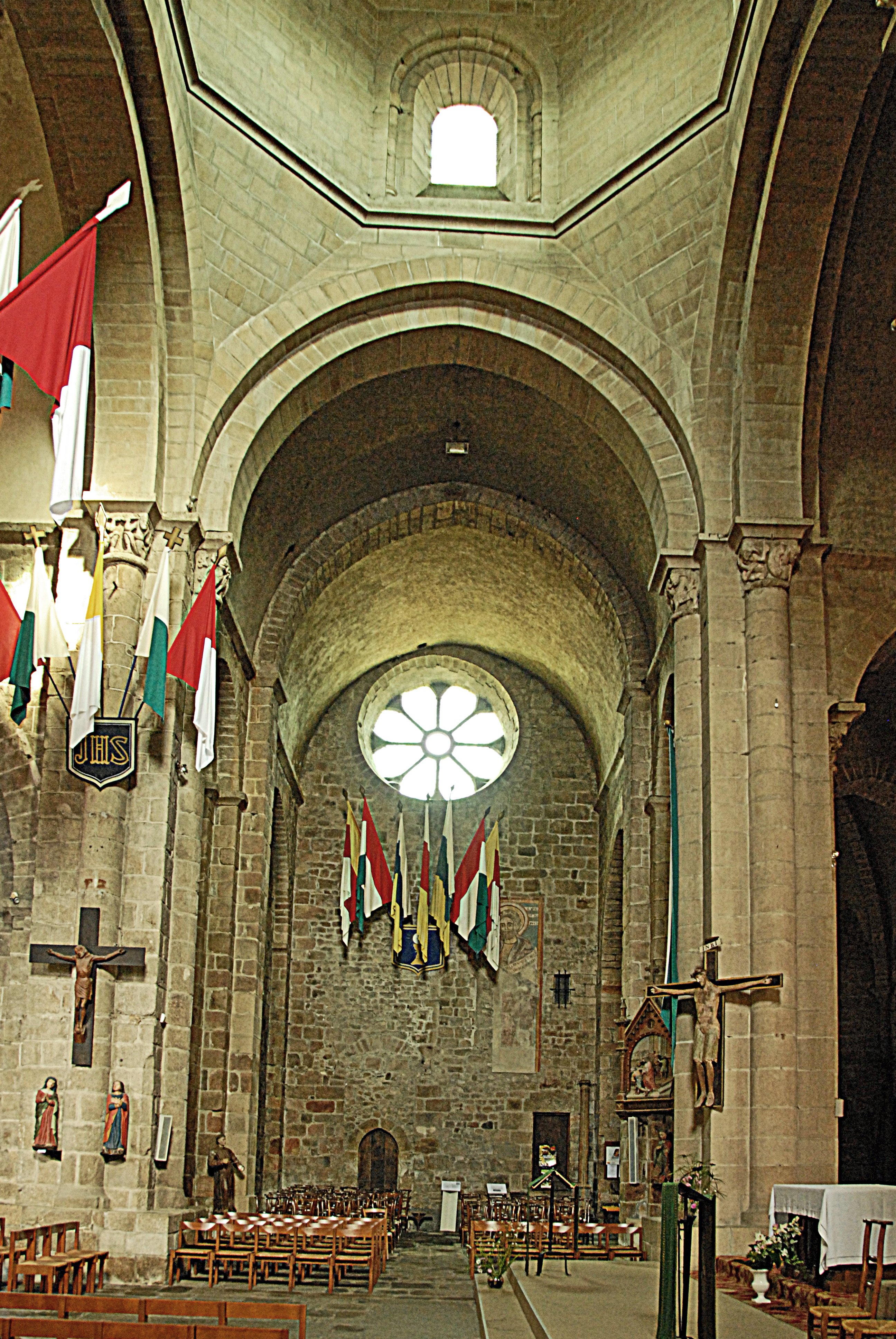 St-Junien, nördl. Querhausarm aus Vierung